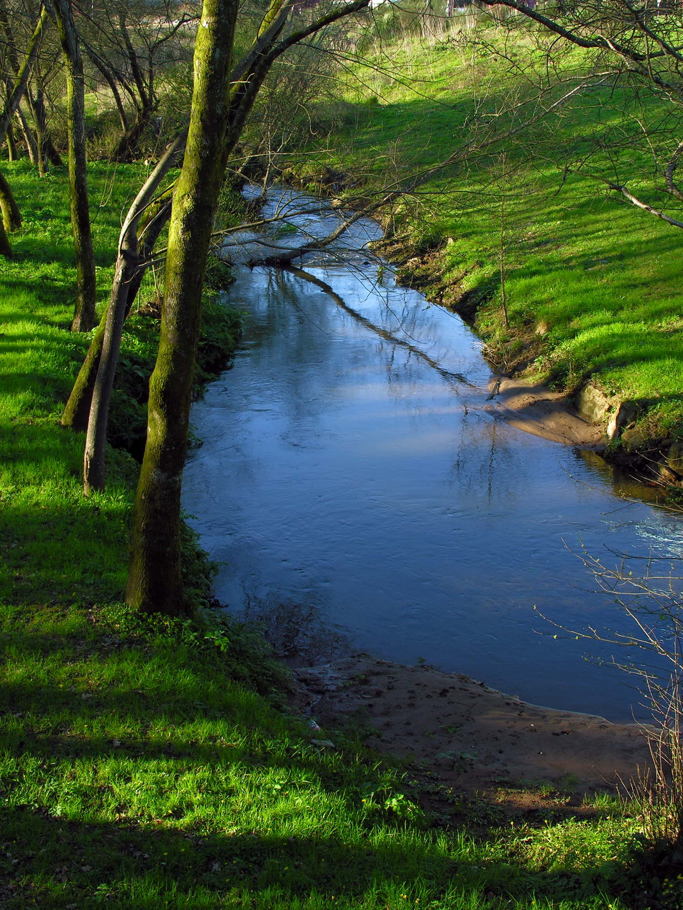 Río Sar, Santiago de Compostela, Galiza, Spain.